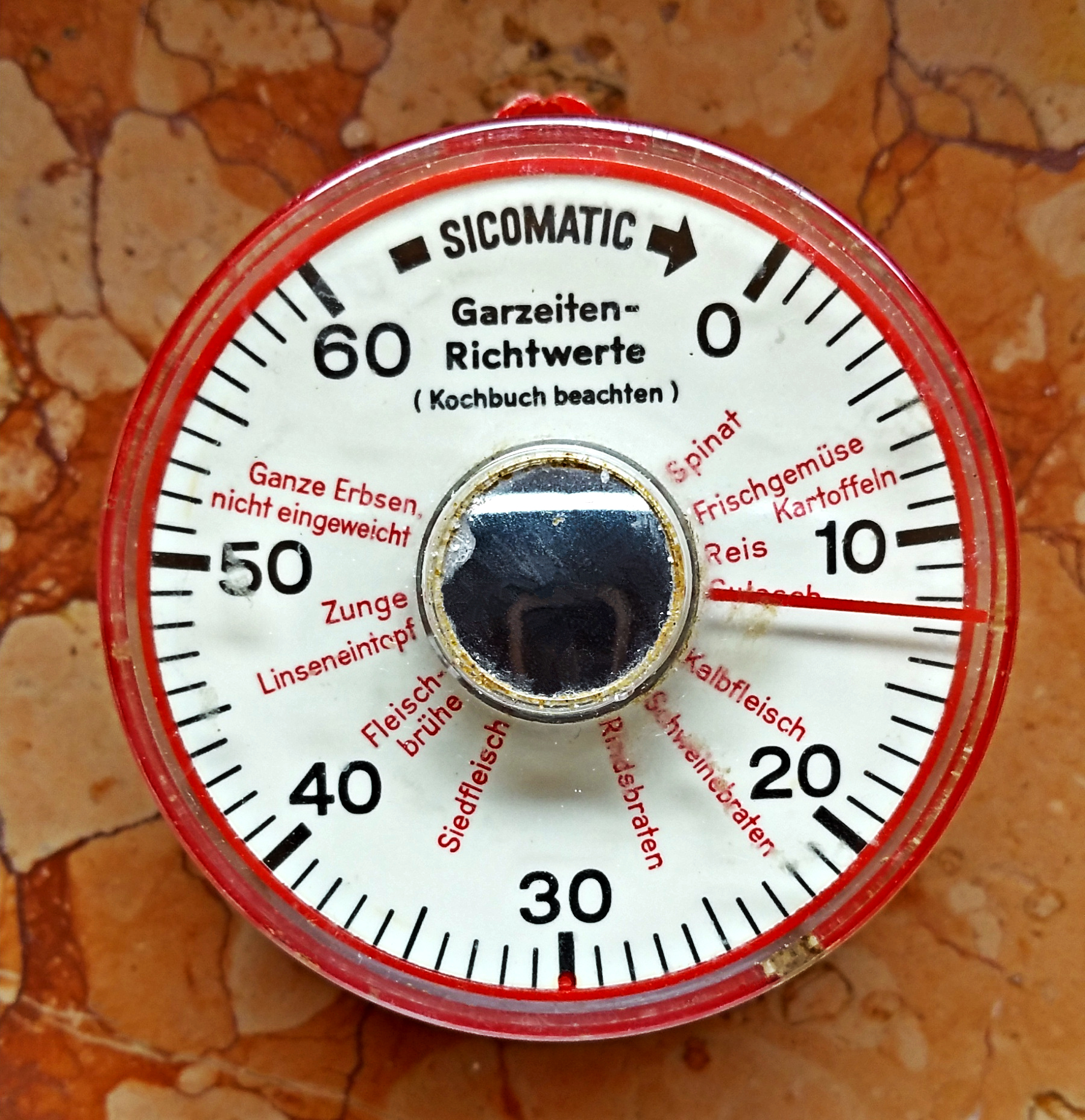 Kurzzeitmesser des Schnellkochtopfherstellers Sicomatic mit Garzeitenrichtwerten für verschiedene Gerichte, Korpusfarbe ist rot, aus den 1970ern